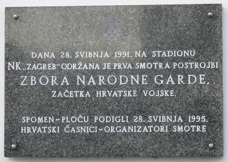 Spomen ploča u Kranjčevičevoj, Zagreb, na prvu smotru postrojbi Zbora narodne garde 28. svibnja 1991.